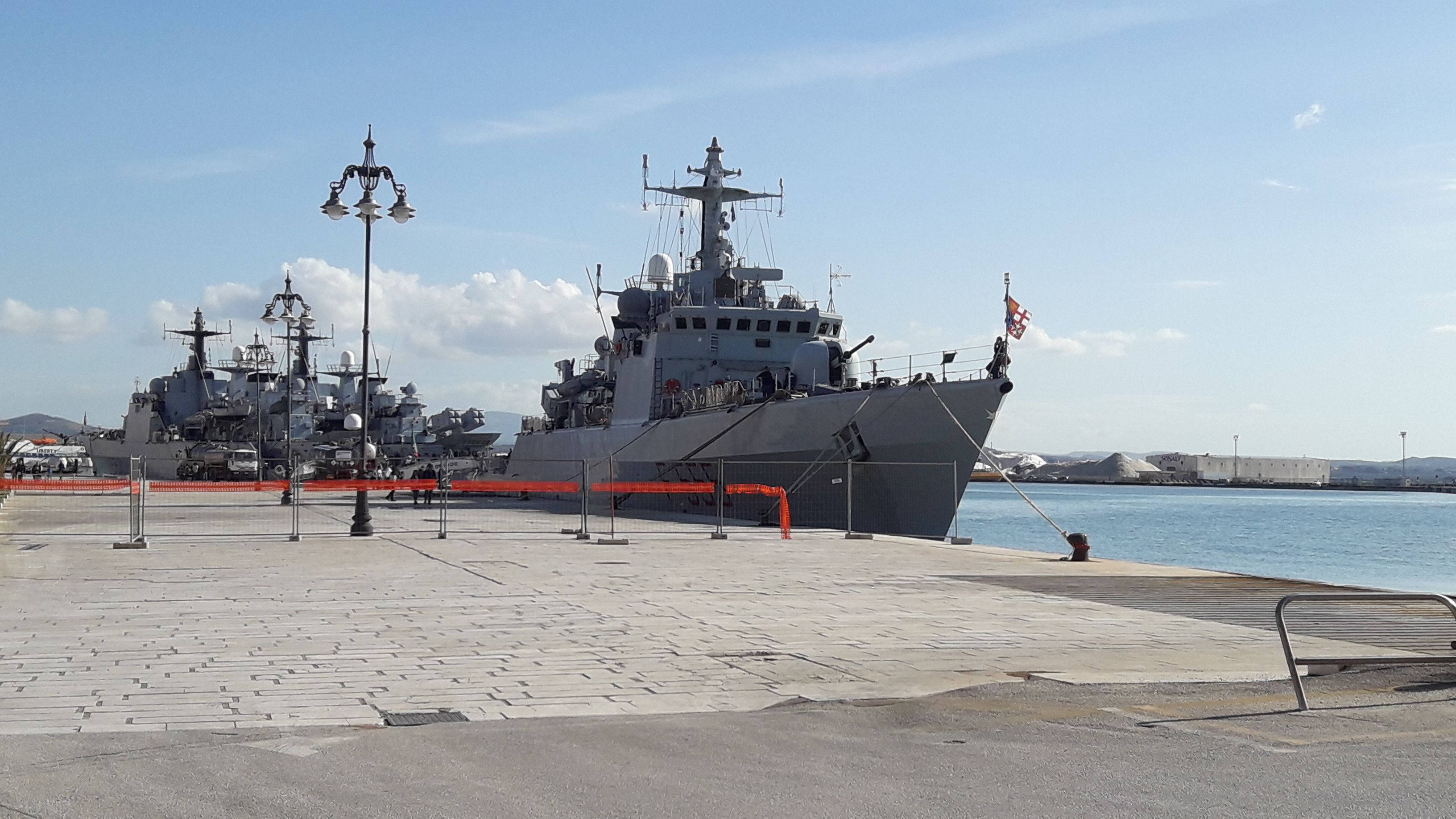 Da destra a sinistra: le corvette della Marina militare italiana Driade, Sfinge e Chimera ormeggiate al porto di Trapani